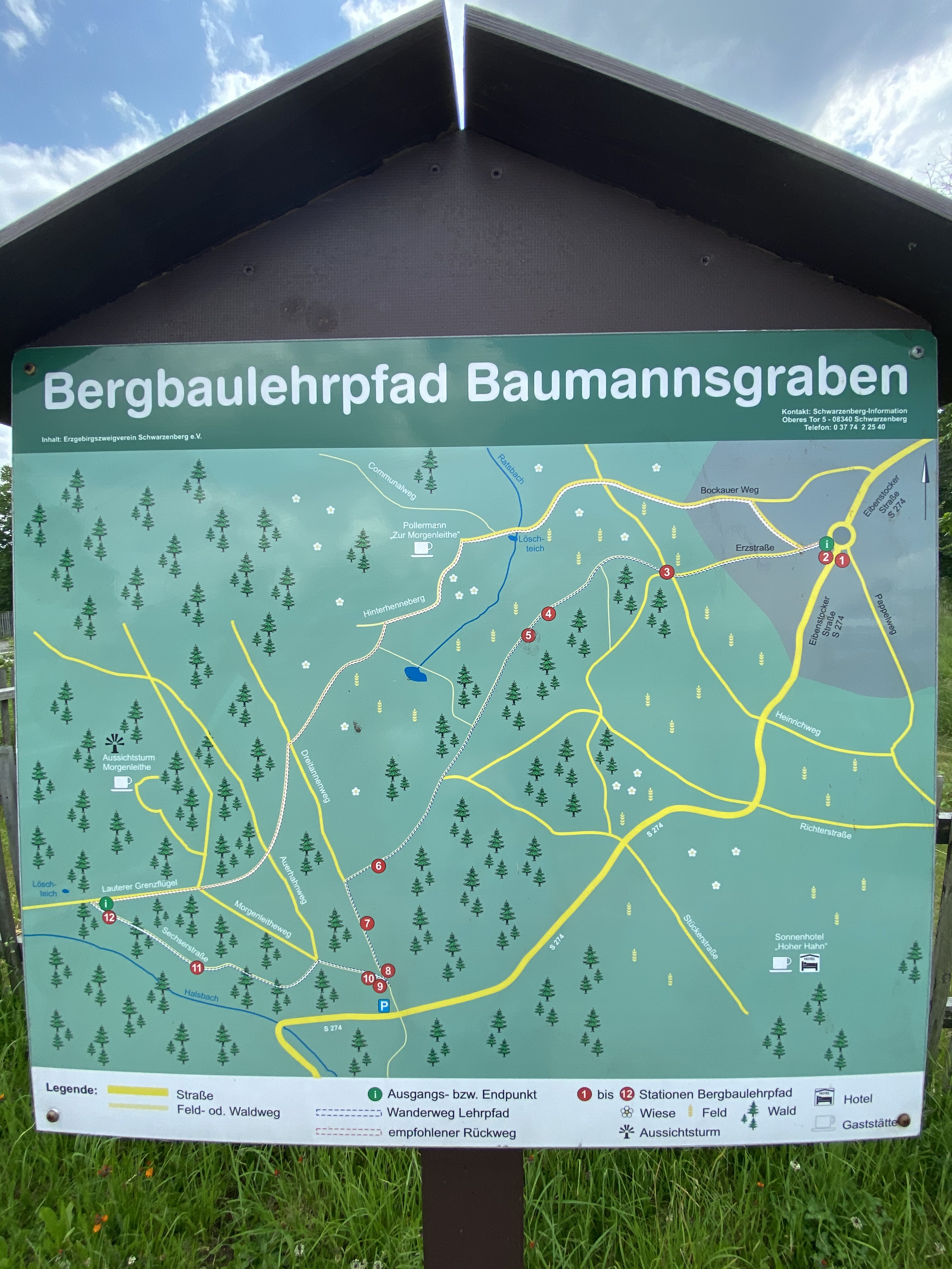 Übersichtskarte Bergbaulehrpfad Baumannsgraben (2020)